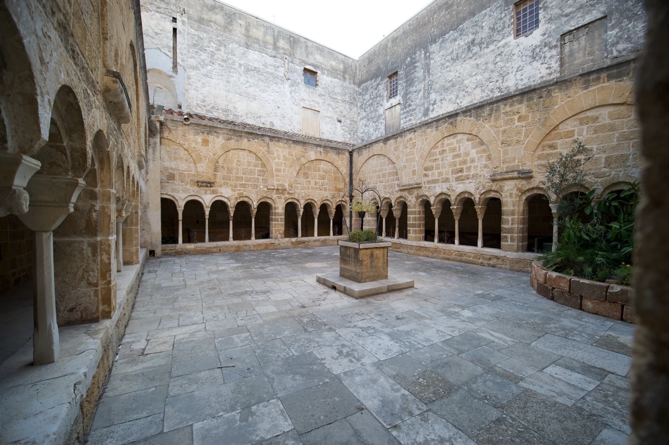 Cortile interno del chiostro della Ex Abbazia di San Benedetto a Brindisi